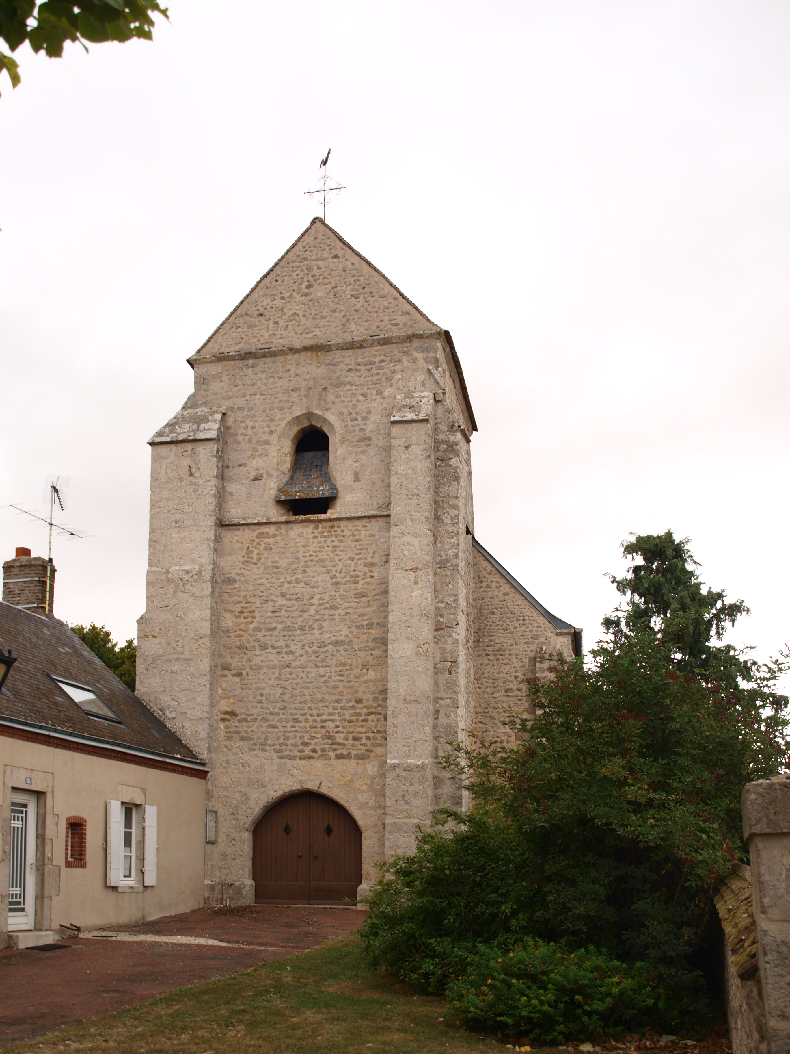 Saint-Cloud-en-Dunois (Eure-et-Loir, France) ; église